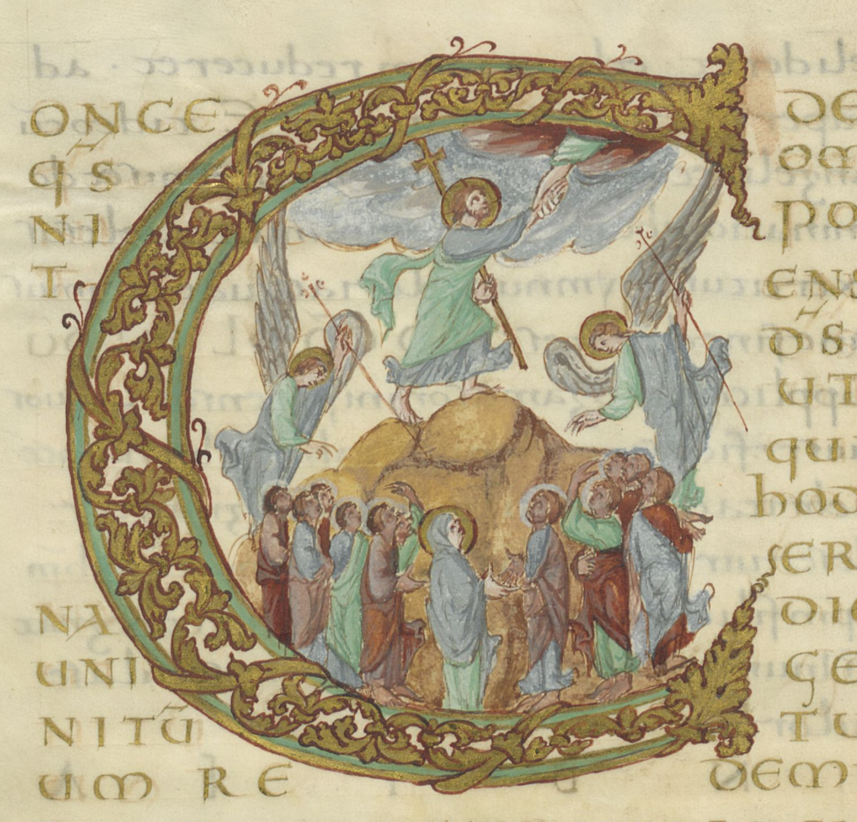 Miniature représentant l'Ascension du Christ dans le sacramentaire de Drogon.